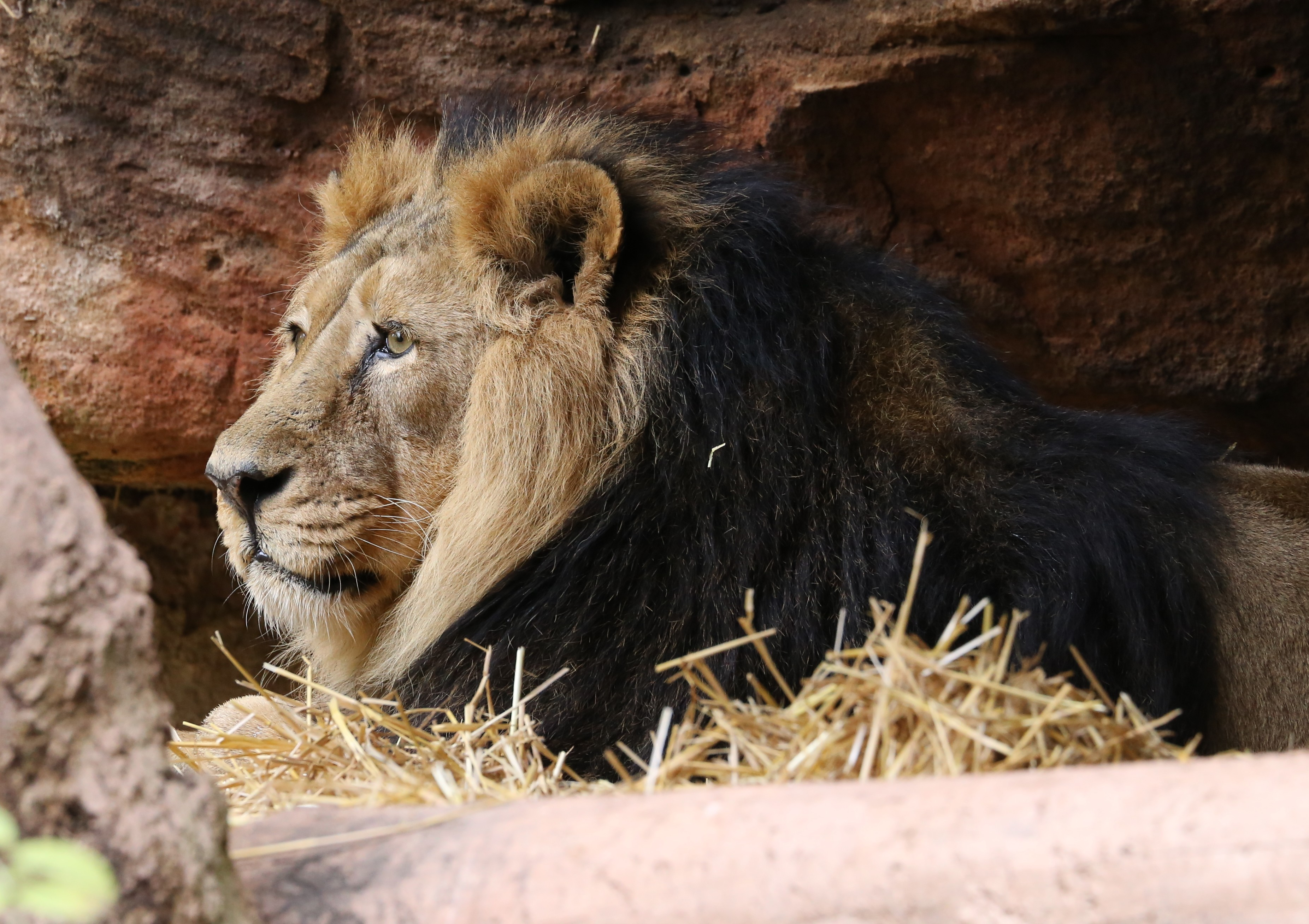 Asiatischer Löwe (Panthera leo persica), Tiergarten Nürnberg